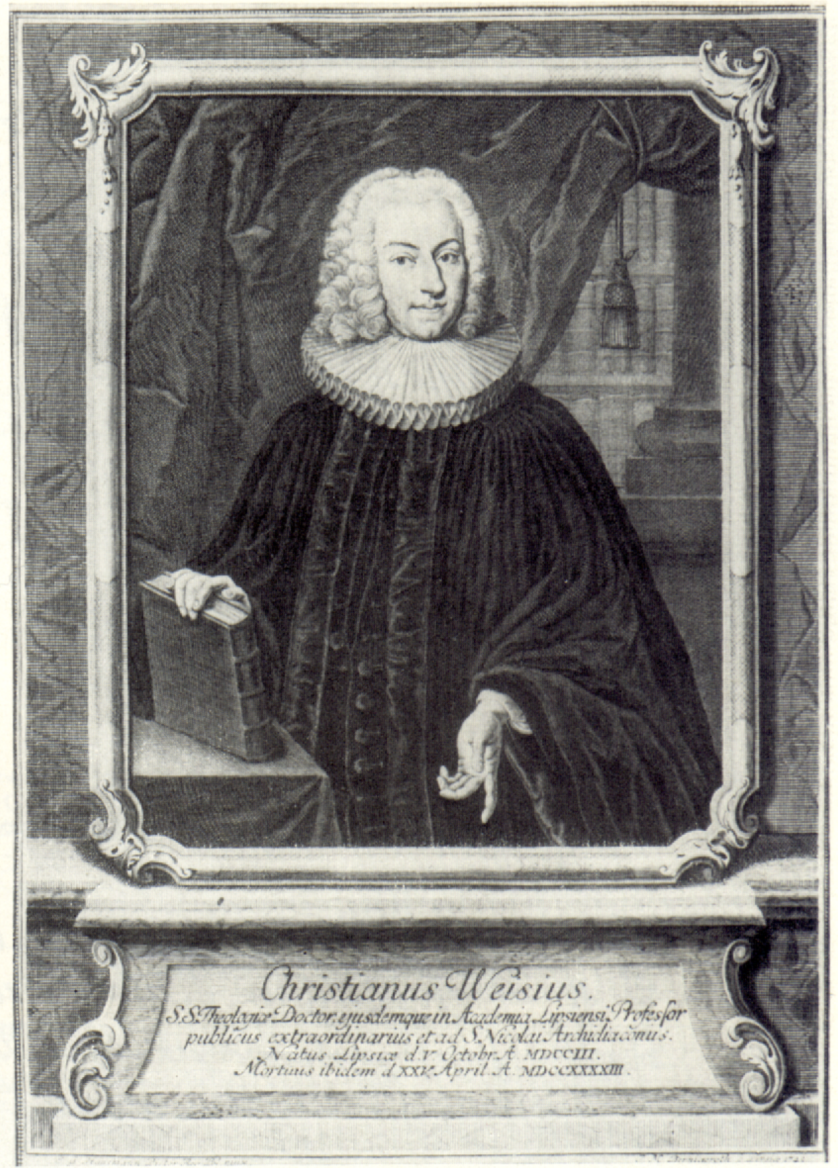 Christian Weiß d. J. , Archidiaconus at Leipzig, engraving after Elias Gottlob Haußmann